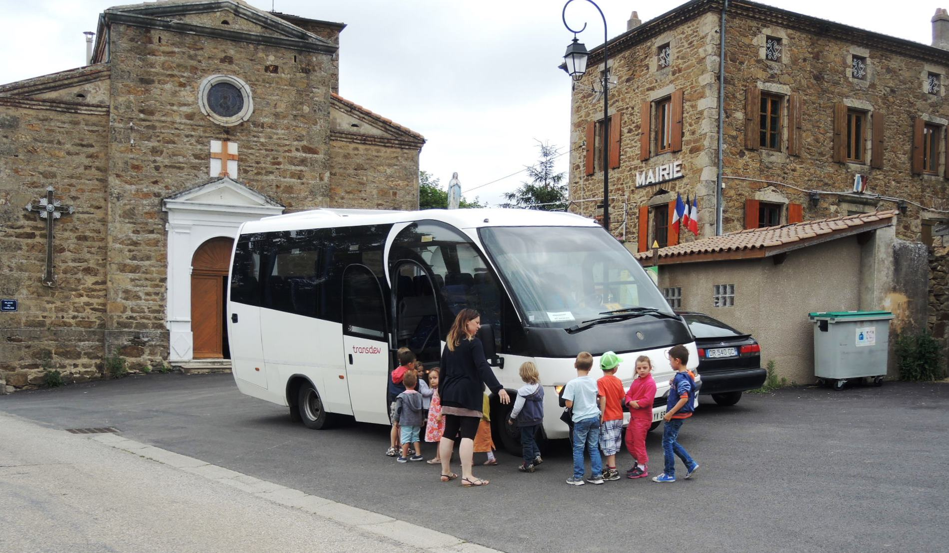 Brossainc détail